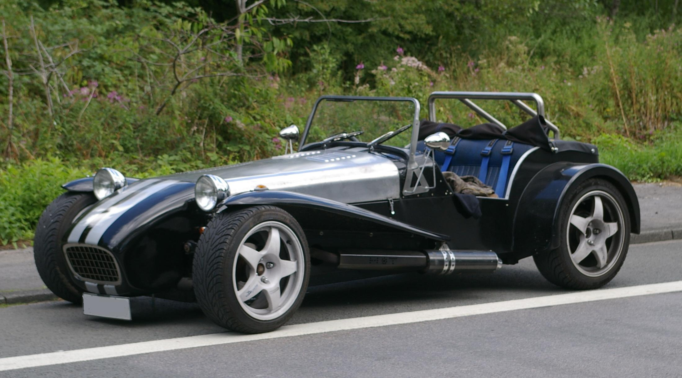 Locost